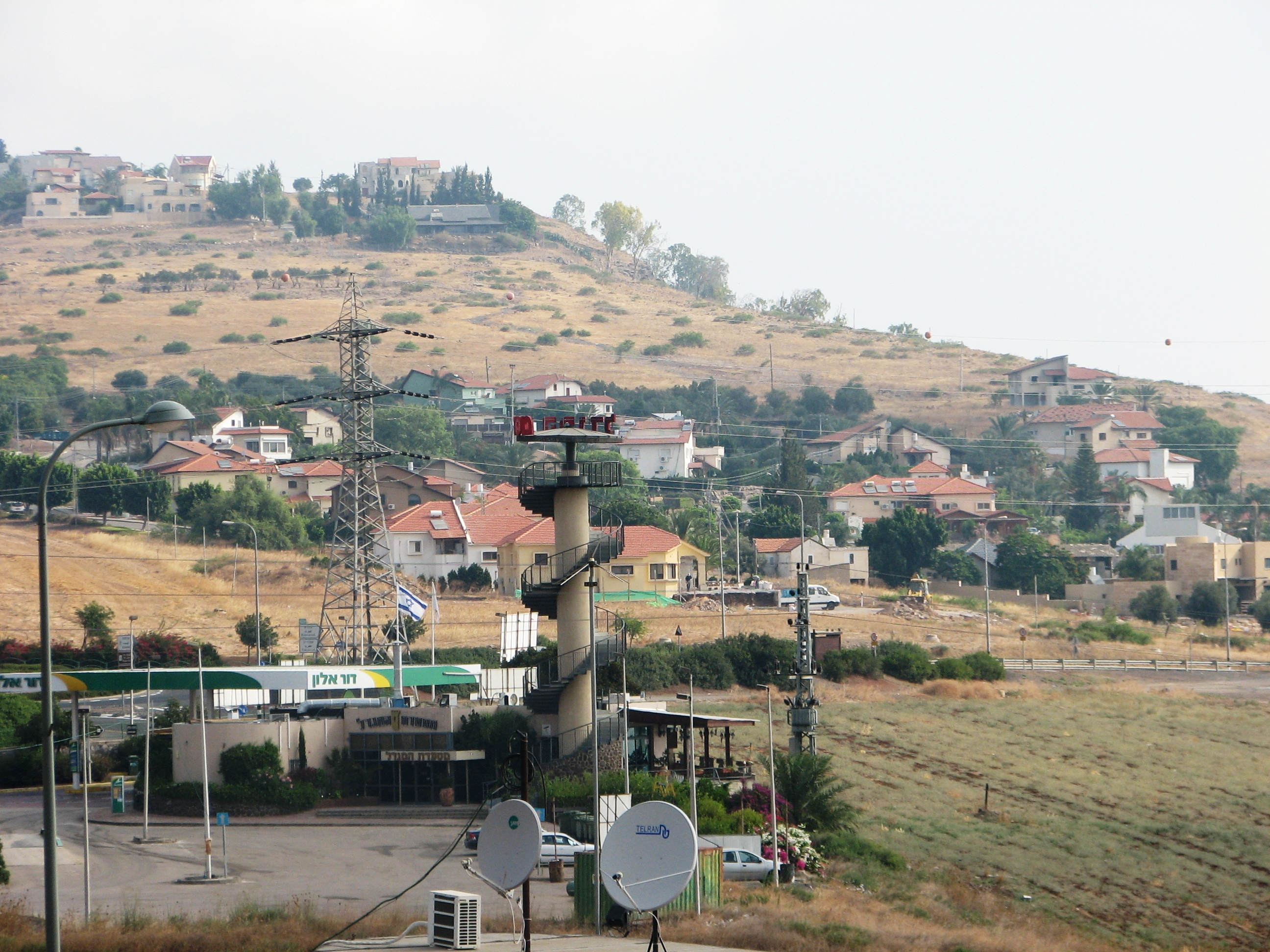 Poriya - Kfar Avoda is a communal settlement in northern Israel Located to the south of the Sea of Galilee, Israel פוריה-כפר עבודה הינו יישוב קהילתי באזור הצפון ליד העיר טבריה, על רכס פוריה ושייך למועצה אזורית עמק הירדן, פוריה כפר עבודה מזרח, למעלה פוריה עילית